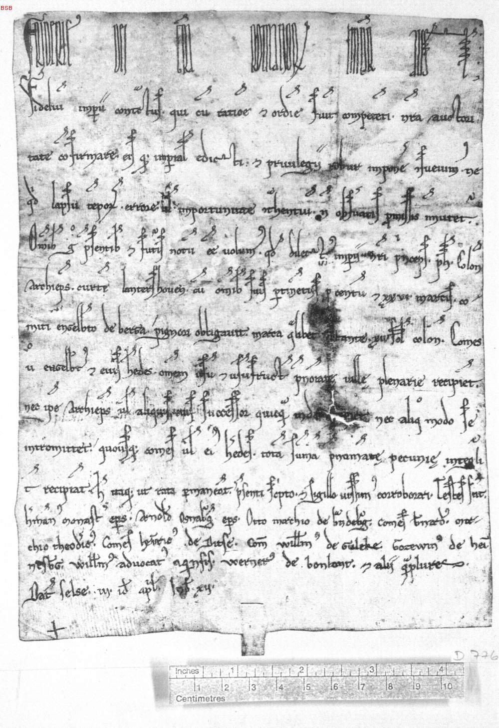 Der Erzbischof von Köln Philipp von Heinsberg verpfändet Lantershofen an den Grafen Engelbert von Berg.